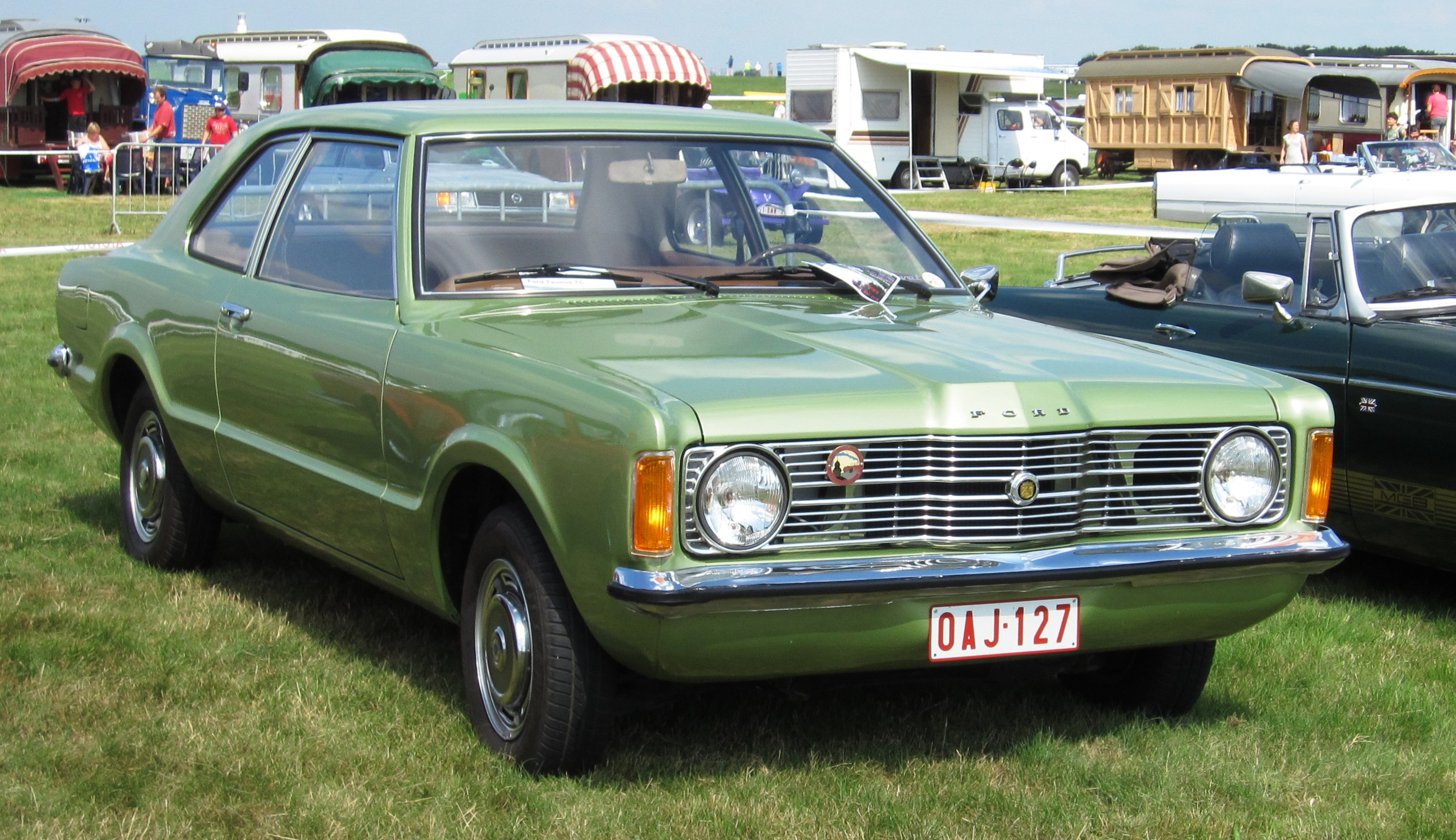 Ford Taunus 1.3 TC en Belgique